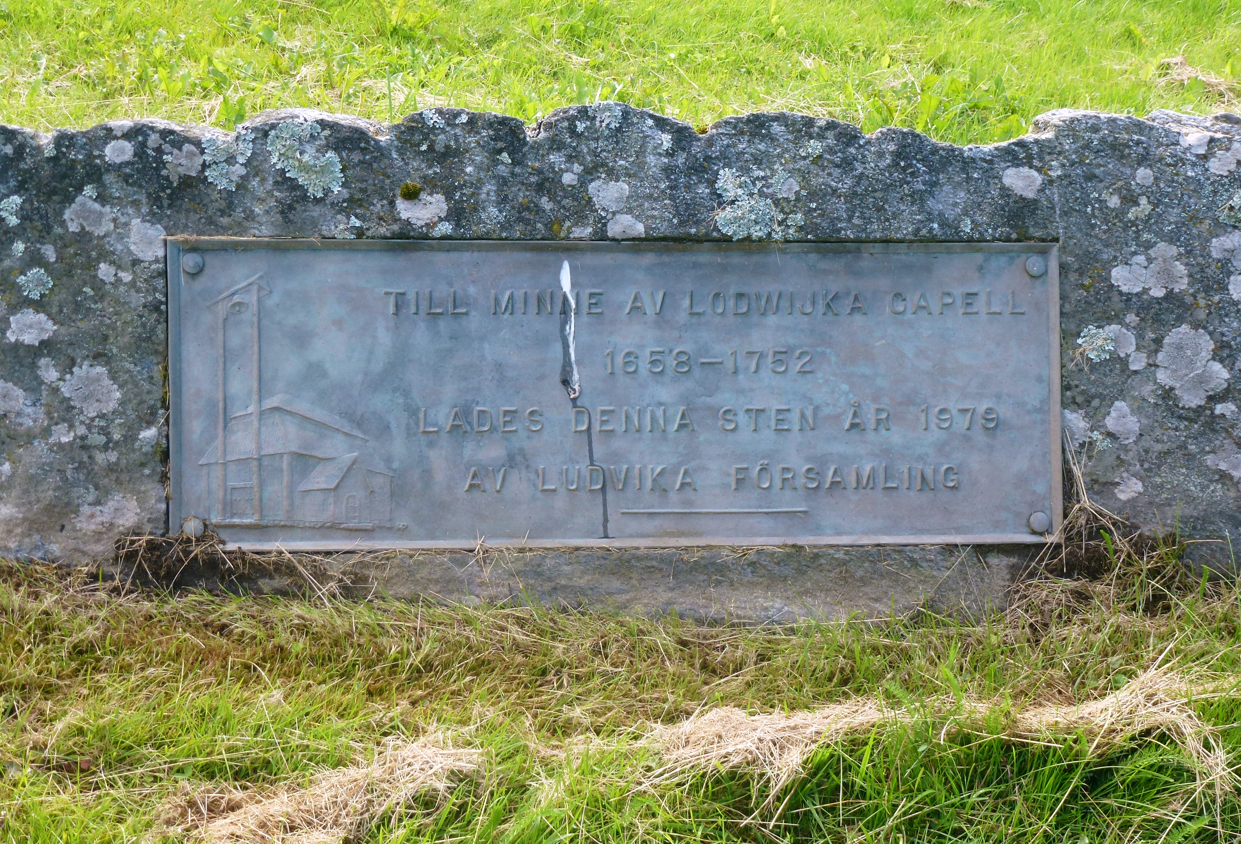 ”Till minnet av Lodwijka Capell 1658-1752 lades denna sten år 1979 av Ludvika församling.”